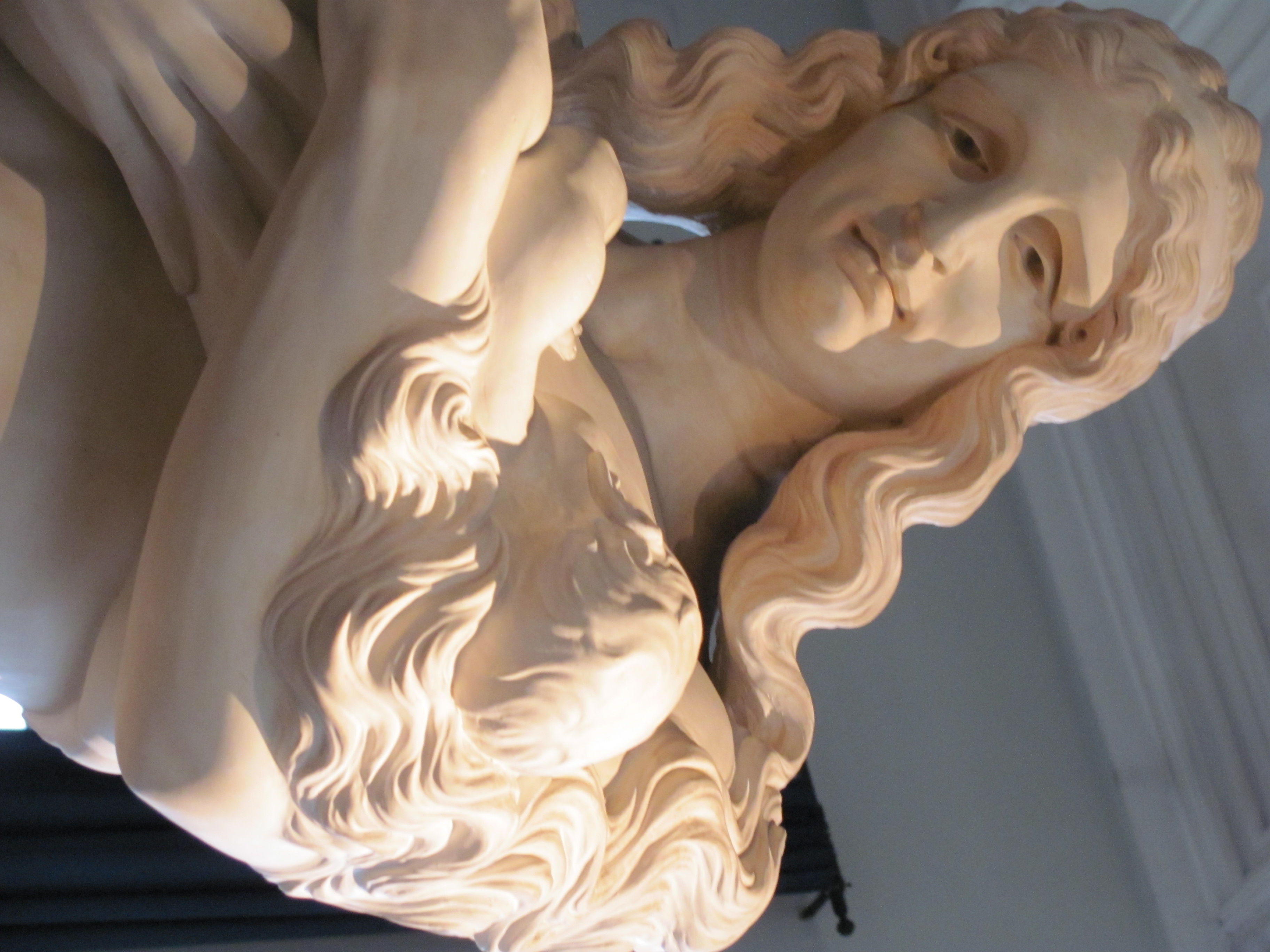 Museo Hendrik C. Andersen - MIBAC This is a photo of a monument which is part of cultural heritage of Italy.